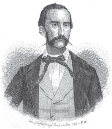 Ján Kalinčiak